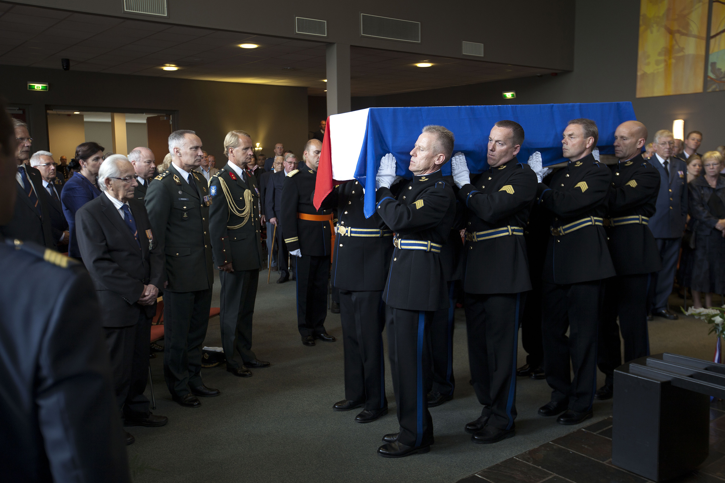 Begrafenis met militair ceremonieel van Ridder in de Militaire Willems-Orde Frits Jan Willem den Ouden